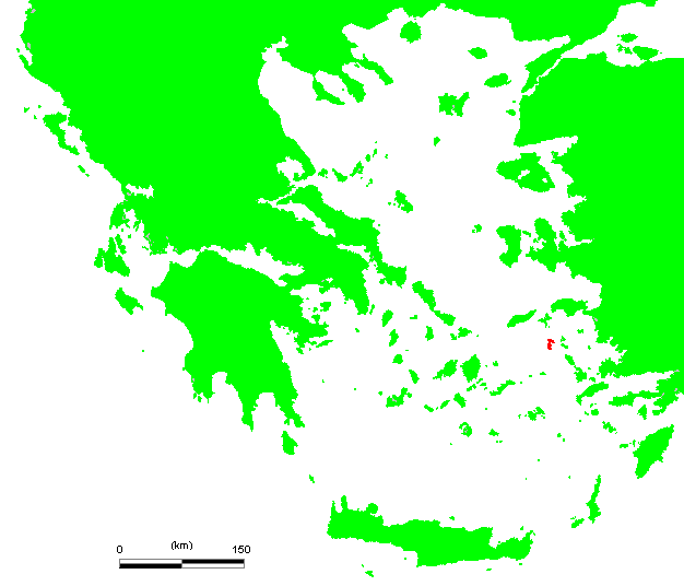 GR Patmos.PNG (Greek island)